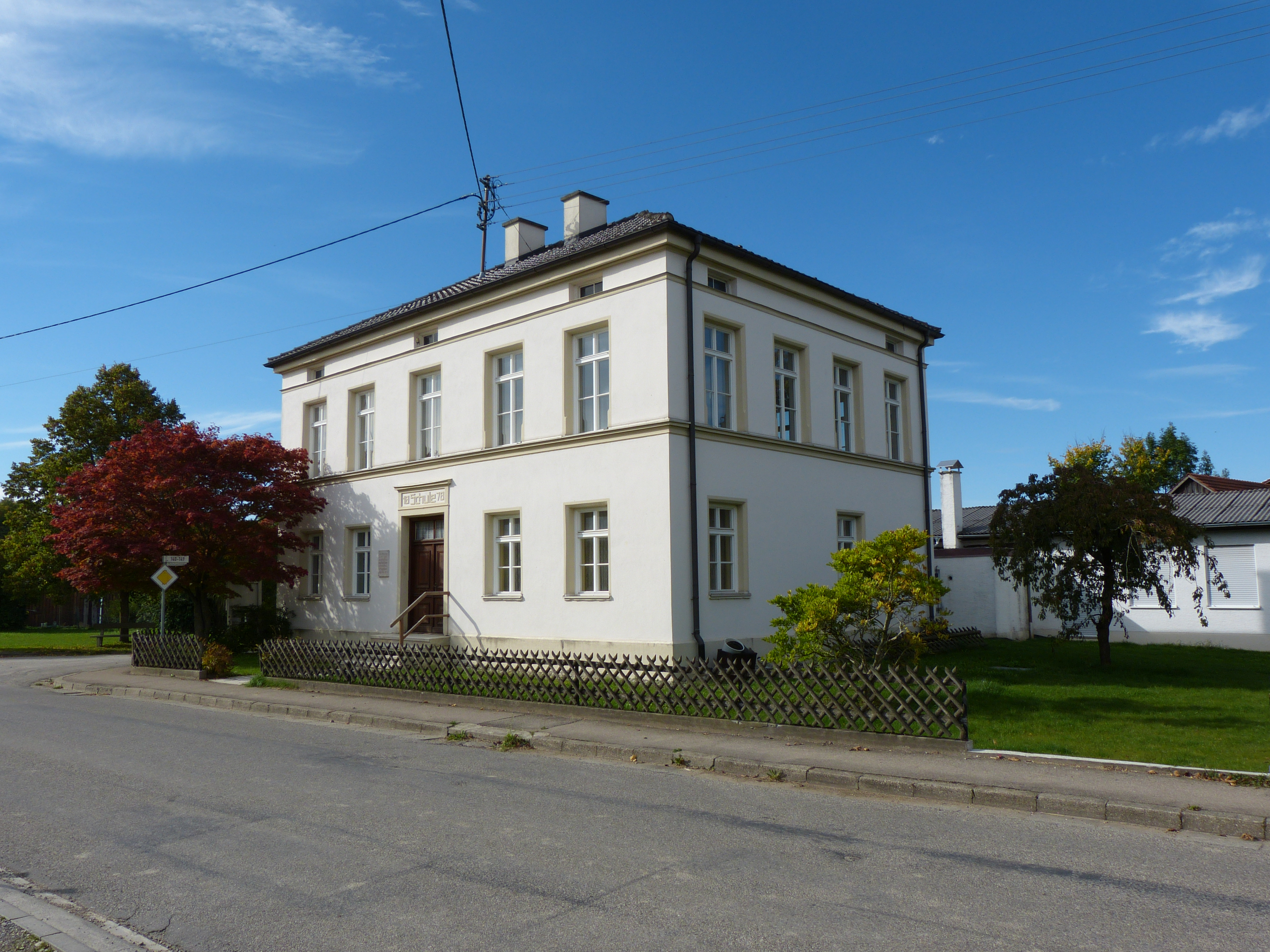 Ehem. Schulhaus in Reichau, Landkreis Unterallgäu, Bayern